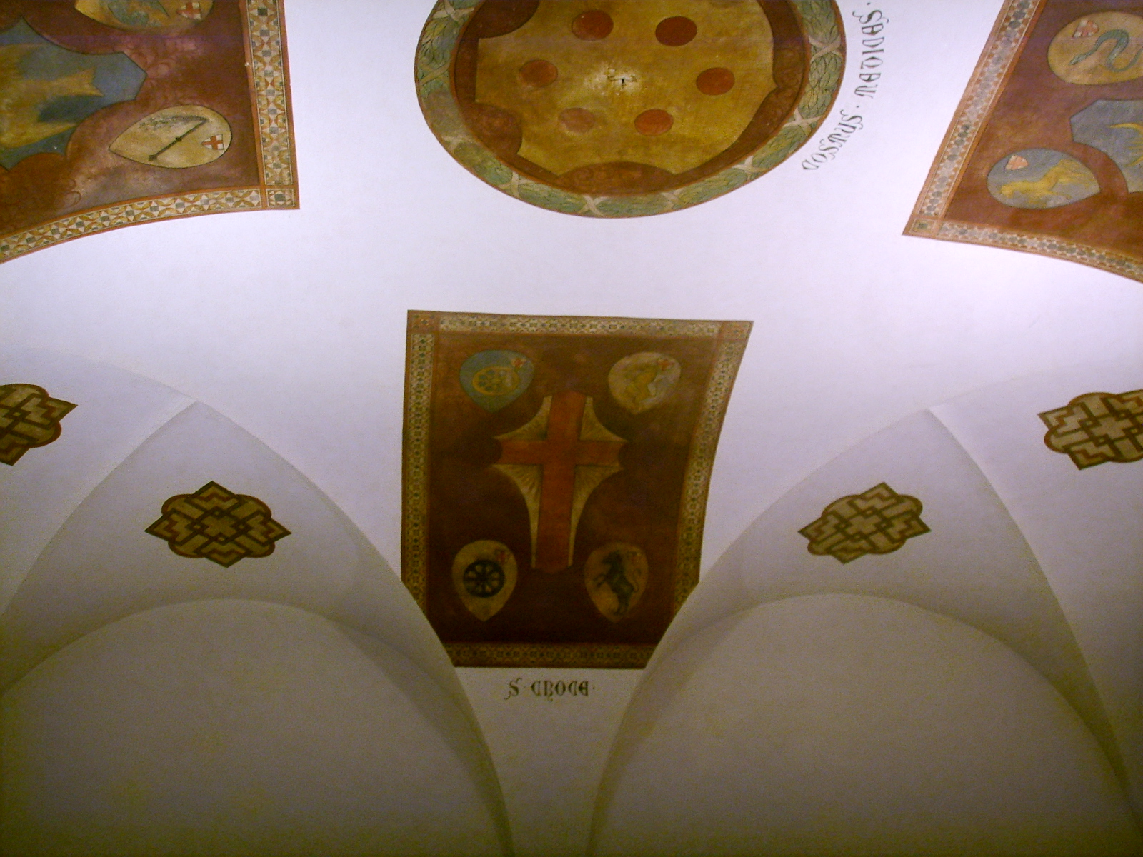 Villa di cafaggiolo sala con stemmi quartieri di firenze